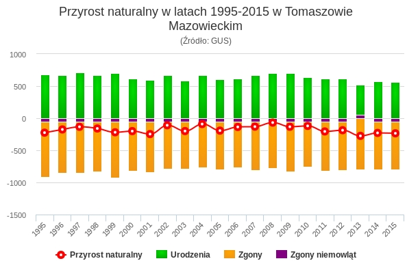 Przyrost naturalny w Tomaszowie